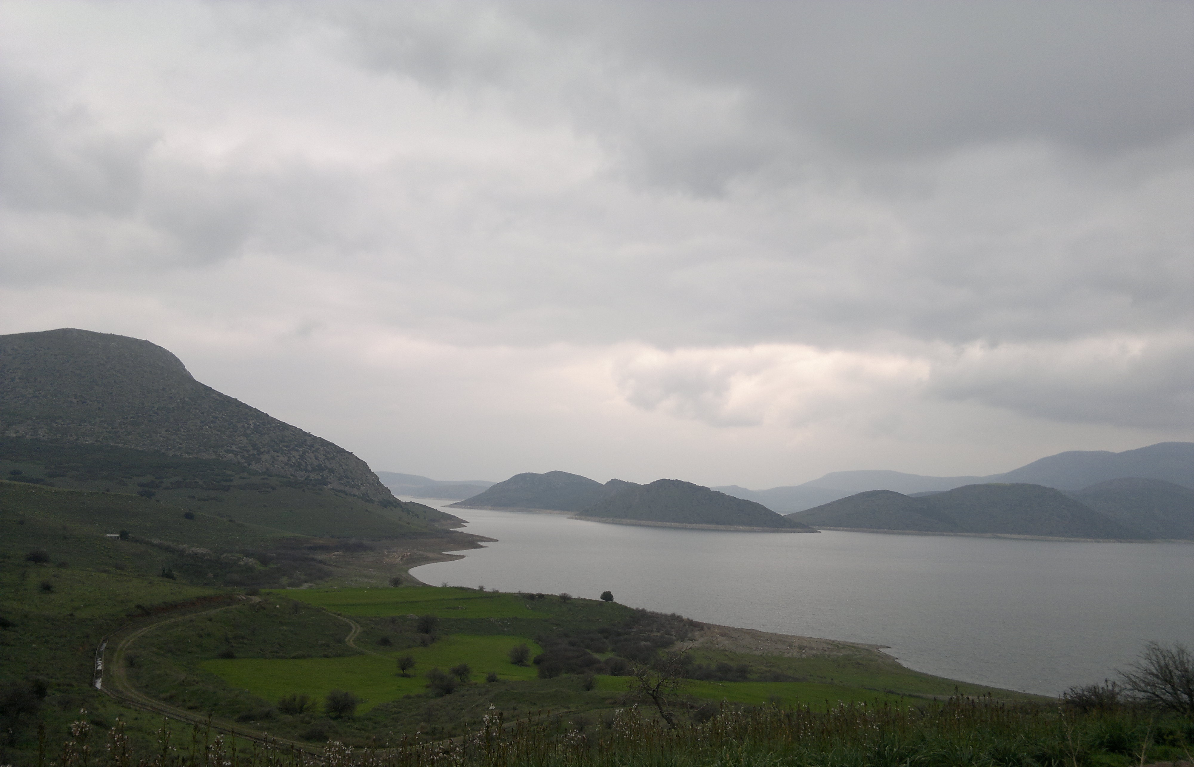 Η Λίμνη Υλίκη